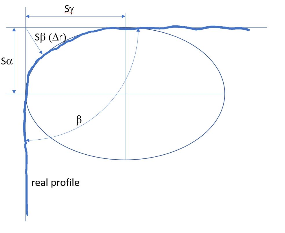 Profil einer Schneidkante mit einer Trompetenform mit eingepasster Ellipse